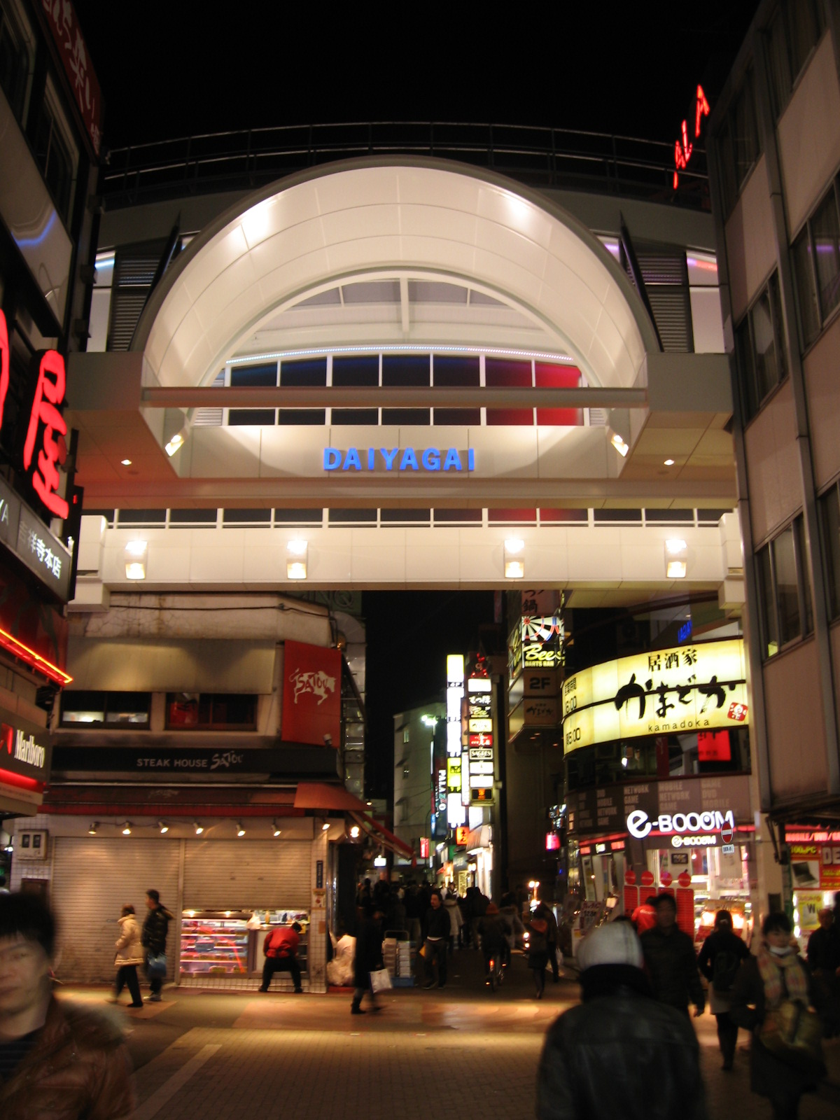 東京の吉祥寺ダイヤ街。左下はメンチカツで有名な肉店。閉店時間のため店舗のシャッターが閉まる模様が見られる。（2009年3月29日夜に撮影）